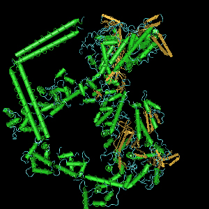 proteine nemo